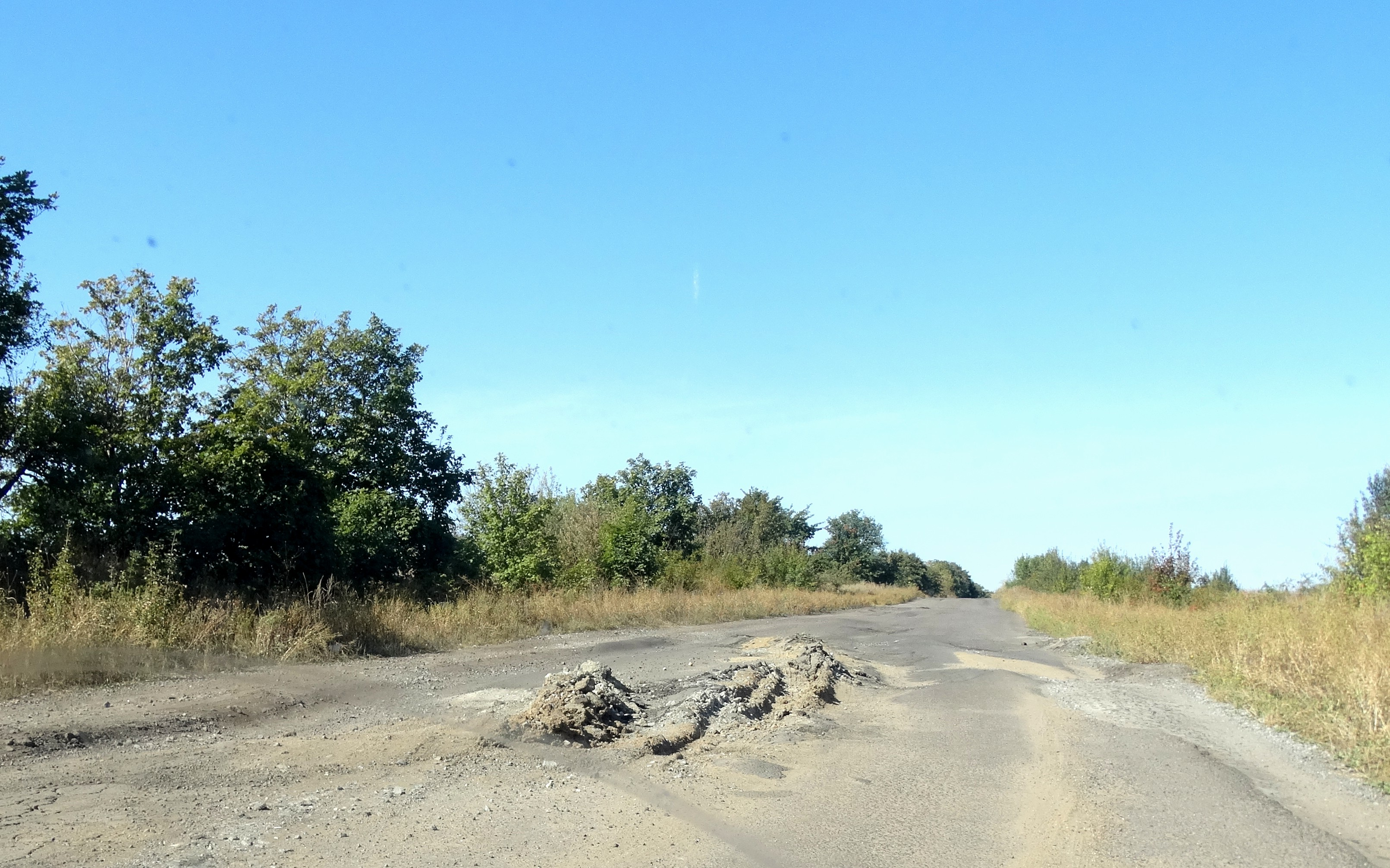 Вікіекспедиція на північ Одещини. Дорога від села Кошарка до села Новосамарка